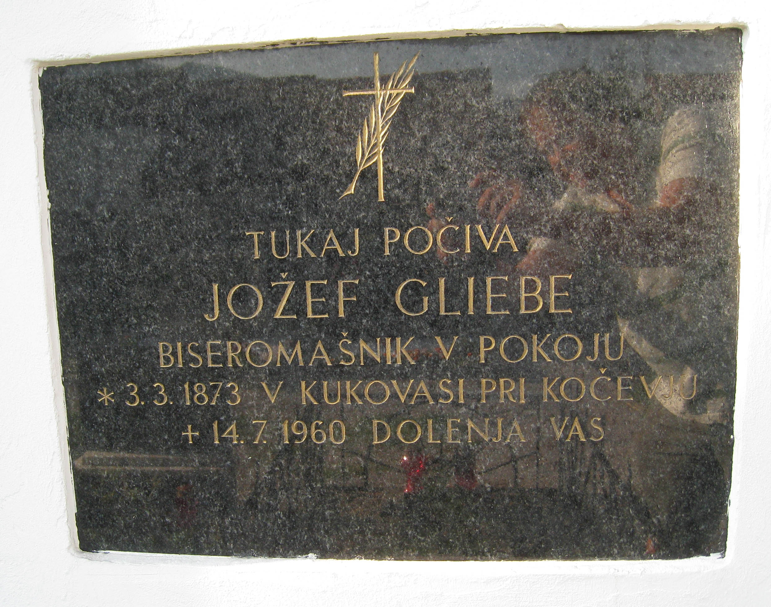 Spominska plošča župniku v Gotenici in Dolenji vasi - Jožef Gliebe - na steni cerkve sv. Petra v Prigorici